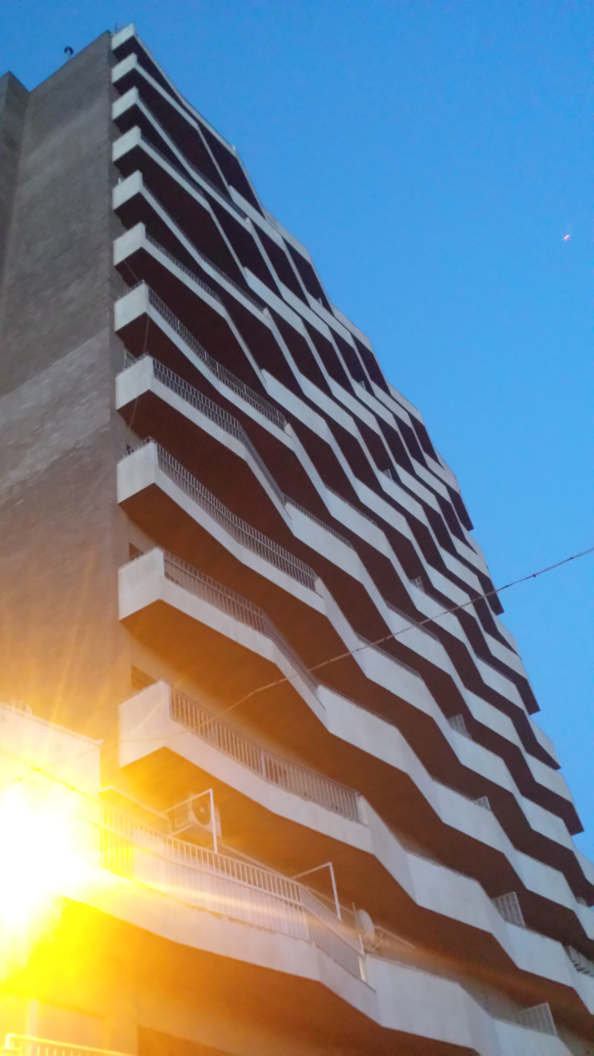 Emblemático edificio de mediados del siglo XX en los alrededores del Parque Abelardo Sánchez. Barrio Franciscanos. Albacete.